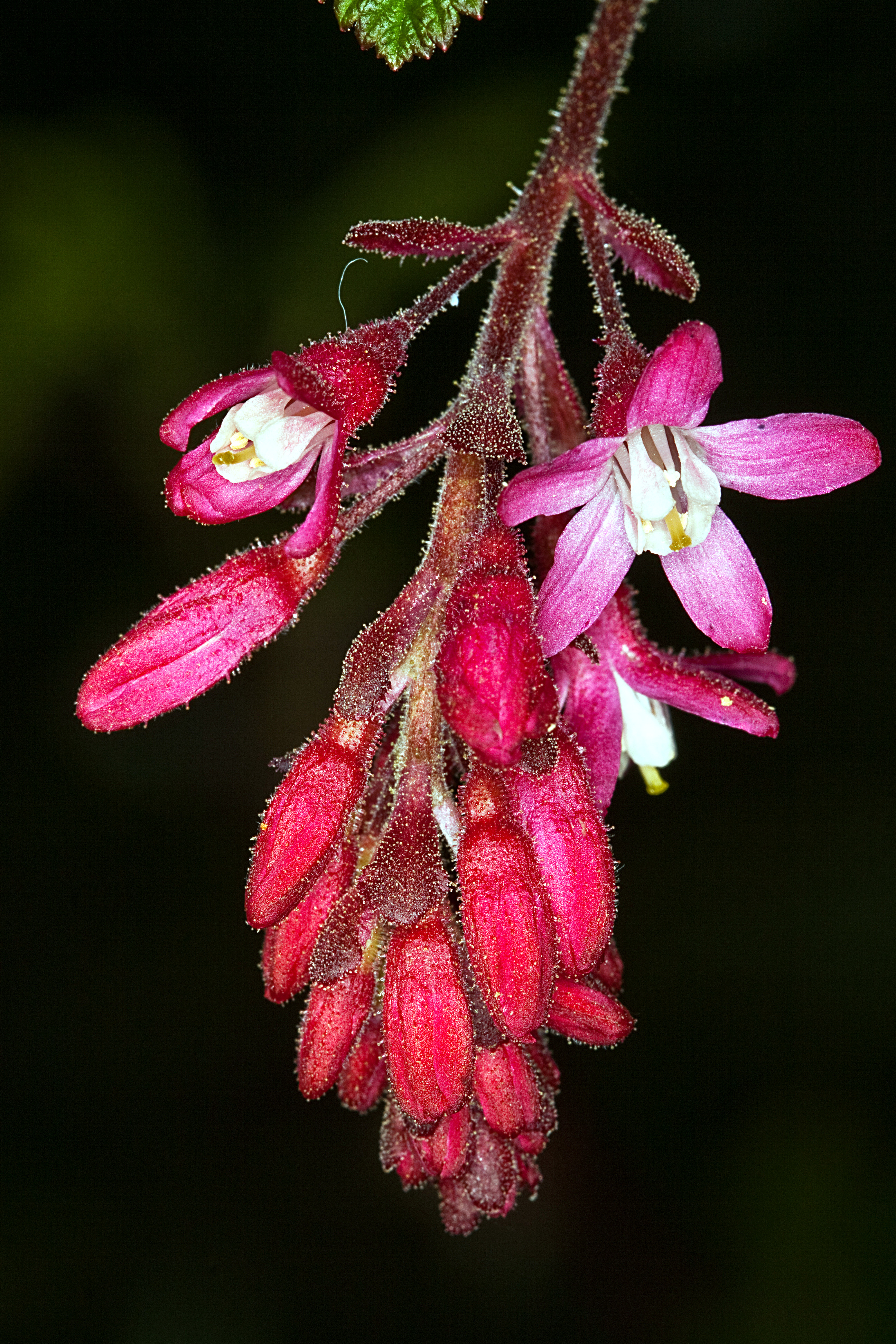 Blut-Johannisbeere (Ribes sanguineum)